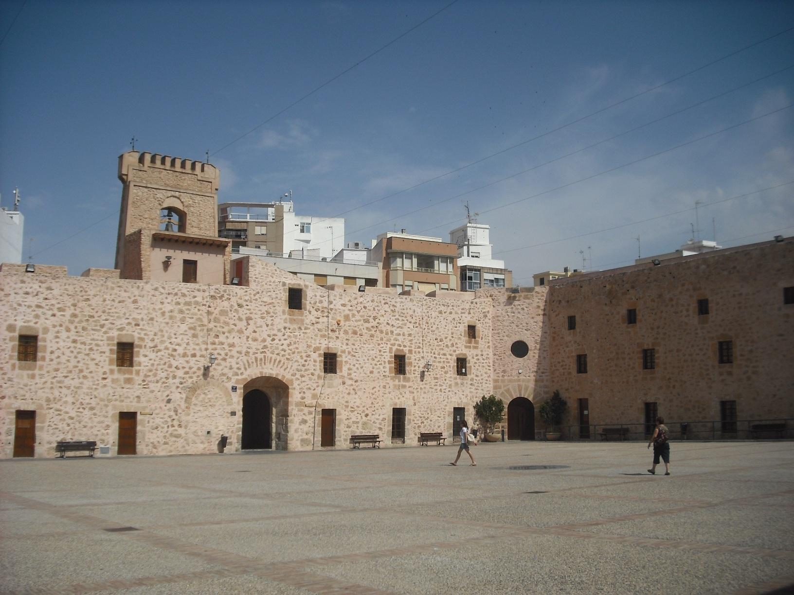 Plaça d'armes del castell de Santa Pola.